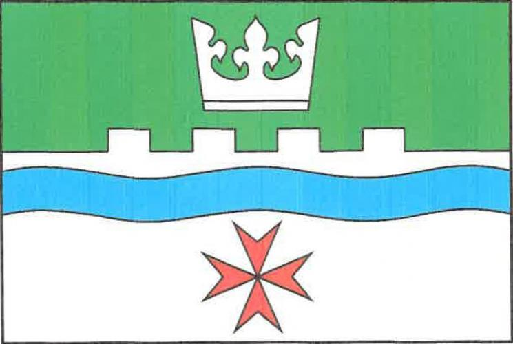 Karlík vlajka